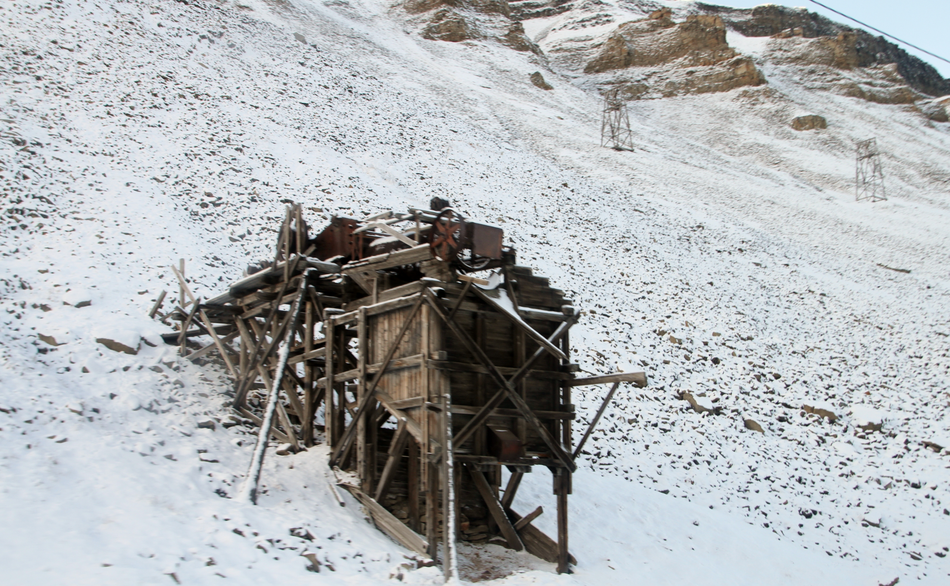 Mining facility from the interwar period, Longyeardalen, by Longyearbyen (Spitsbergen), Norway